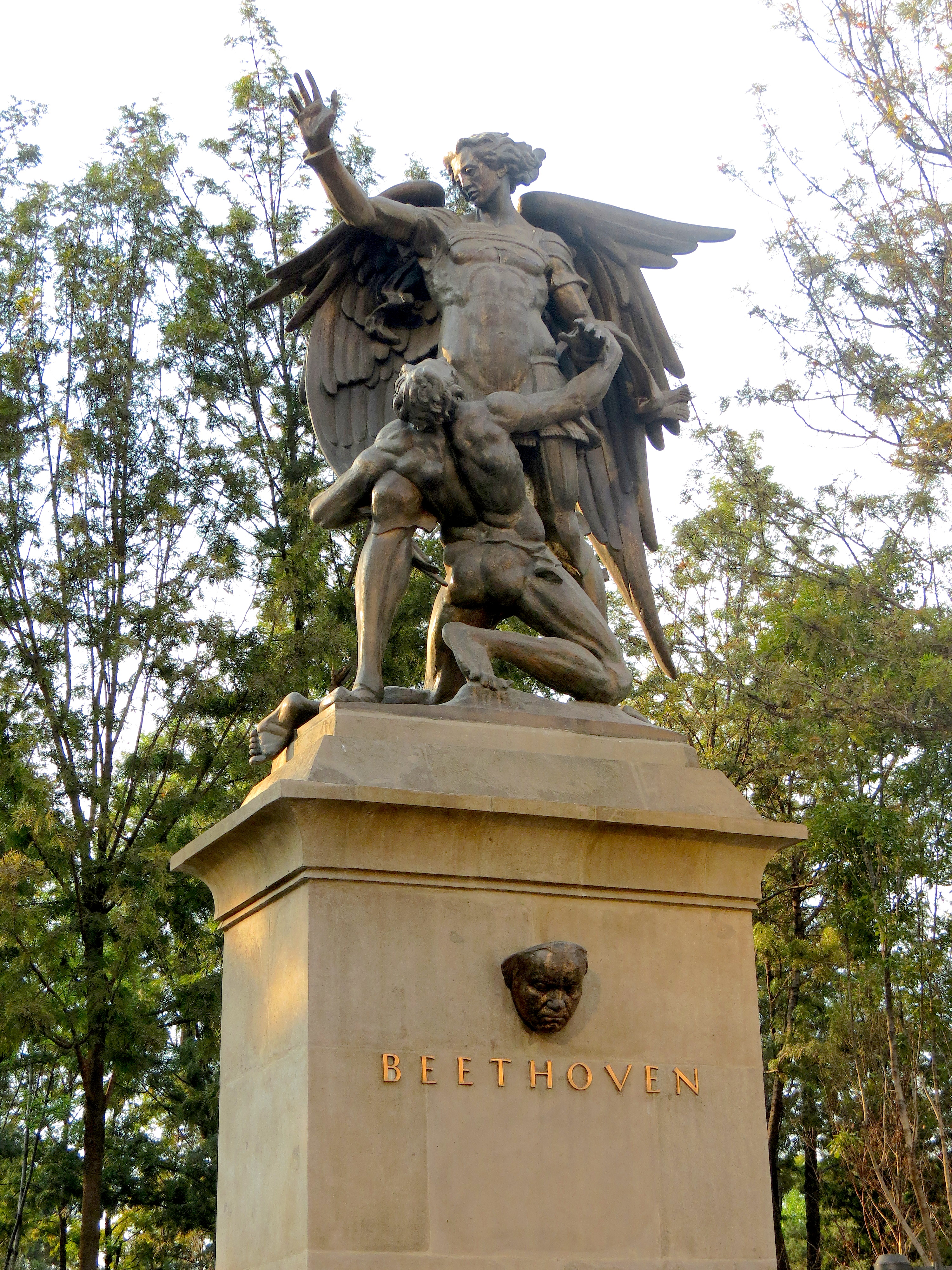 Monumento a Beethoven en la Alameda Central